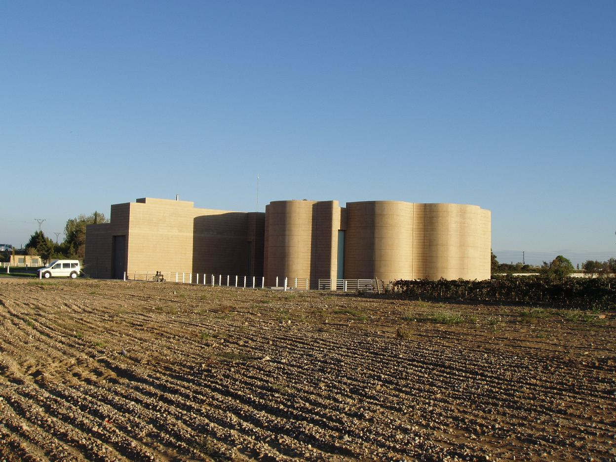 Provincia de Huesca, España.